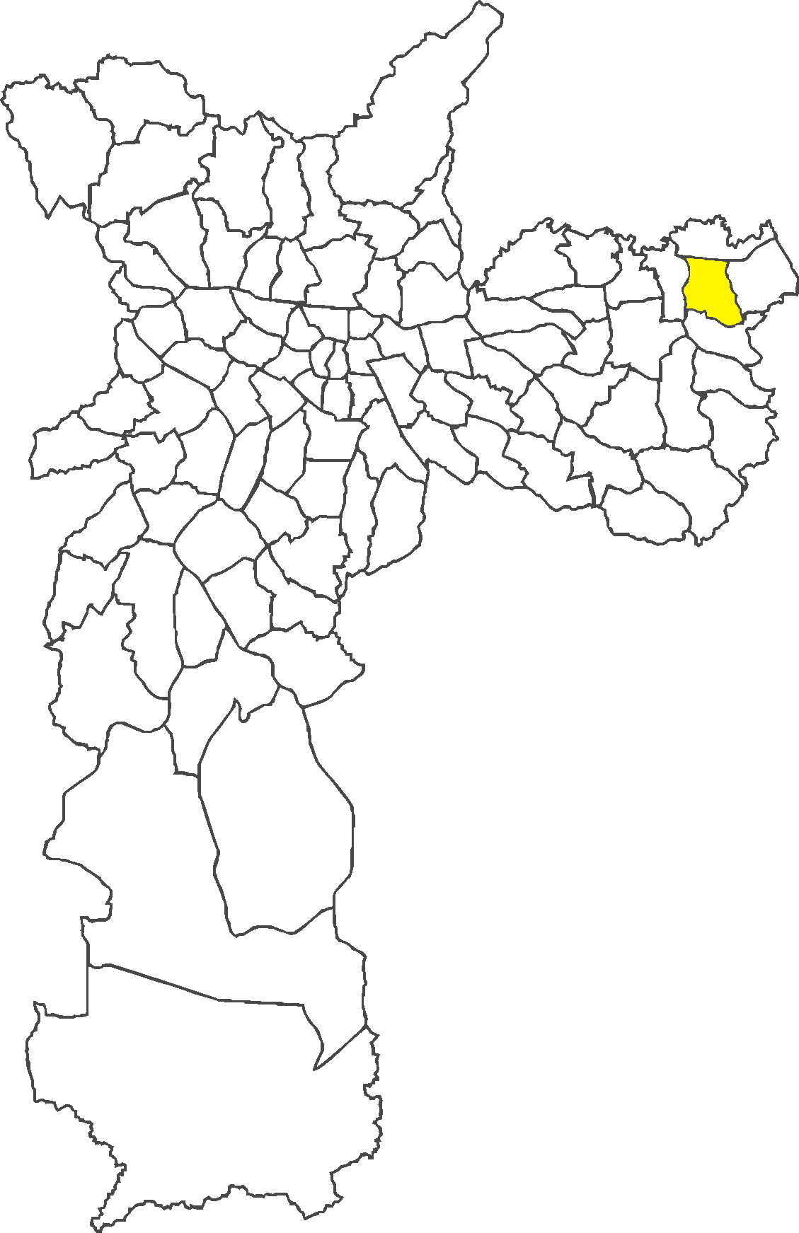 Localização do distrito de VIla Curuçá no município de São Paulo.